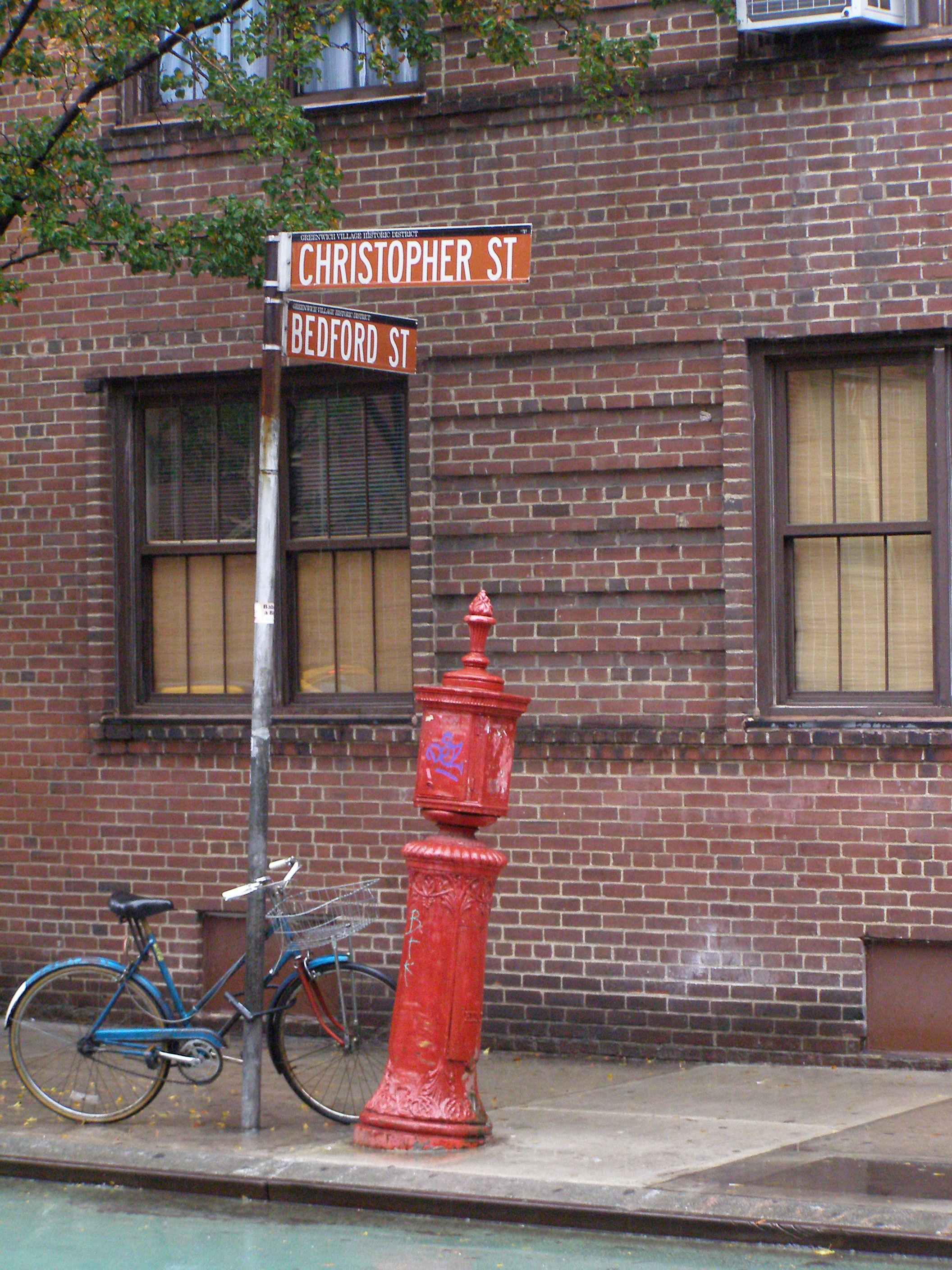 Christopher Street, New York City